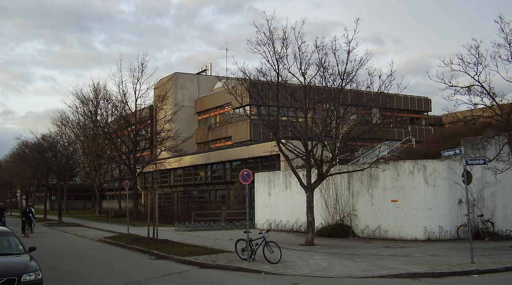 Gymnasium München-Moosach in München (Munich / Germany)